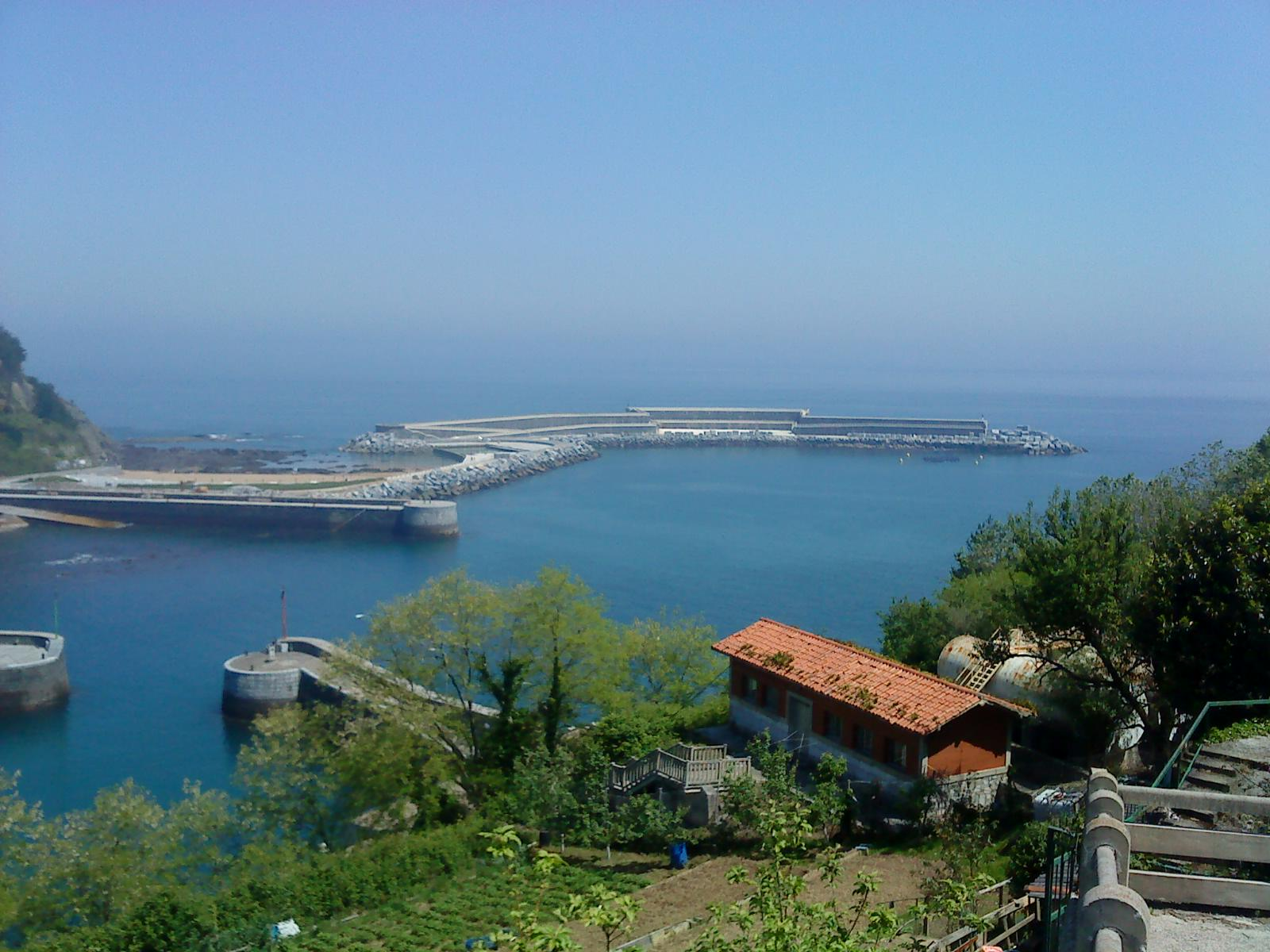 Motrico, vista del nuevo muelle de abrigo.